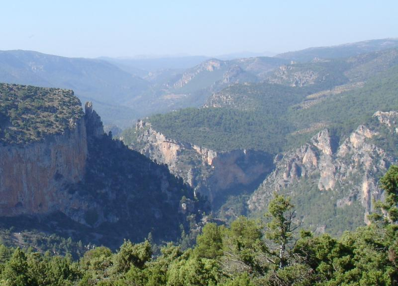 Cañón del río Zumeta